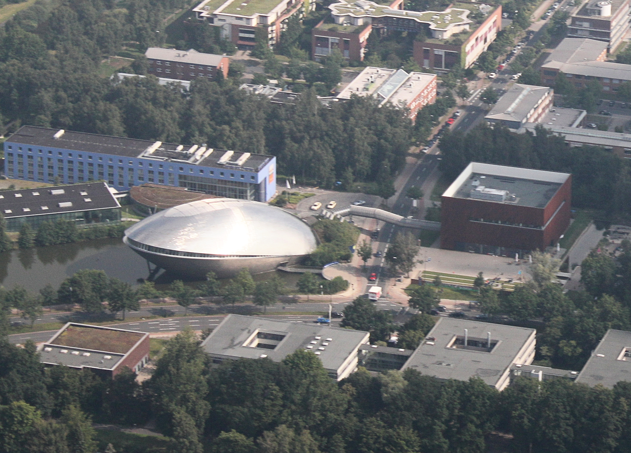 Luftaufnahme Bremen; entlang der A27; Uni Bremen; Flughöhe 500 m